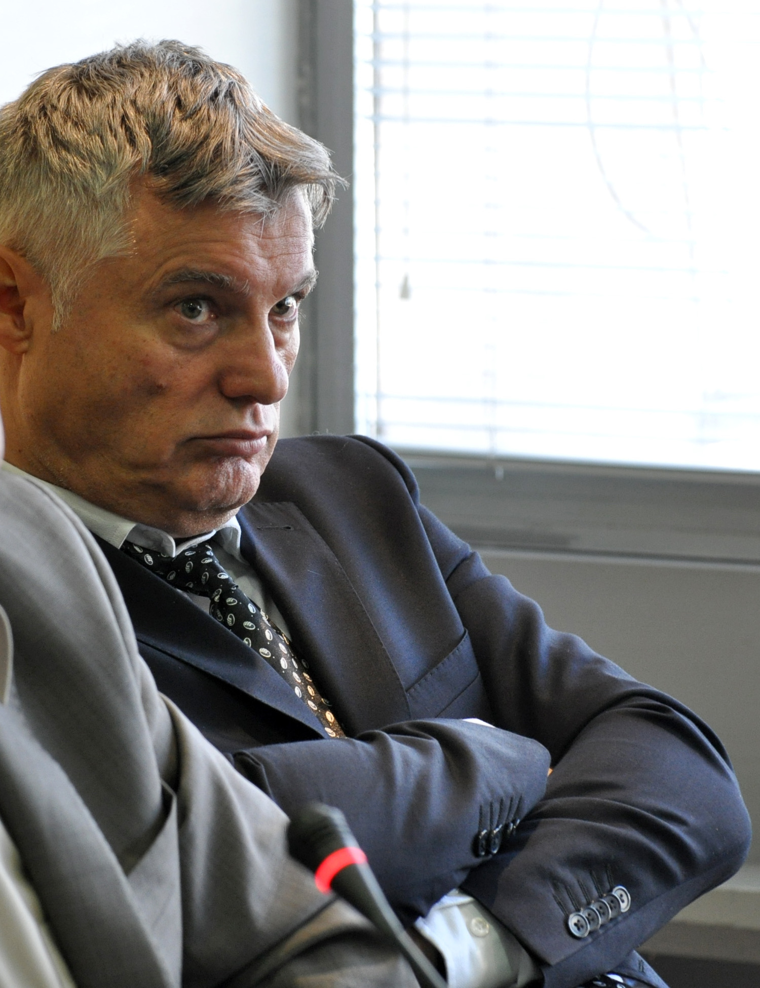 Мирослав Лазански српски новинар